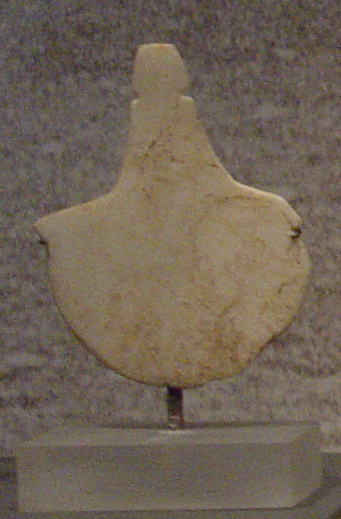 Idol